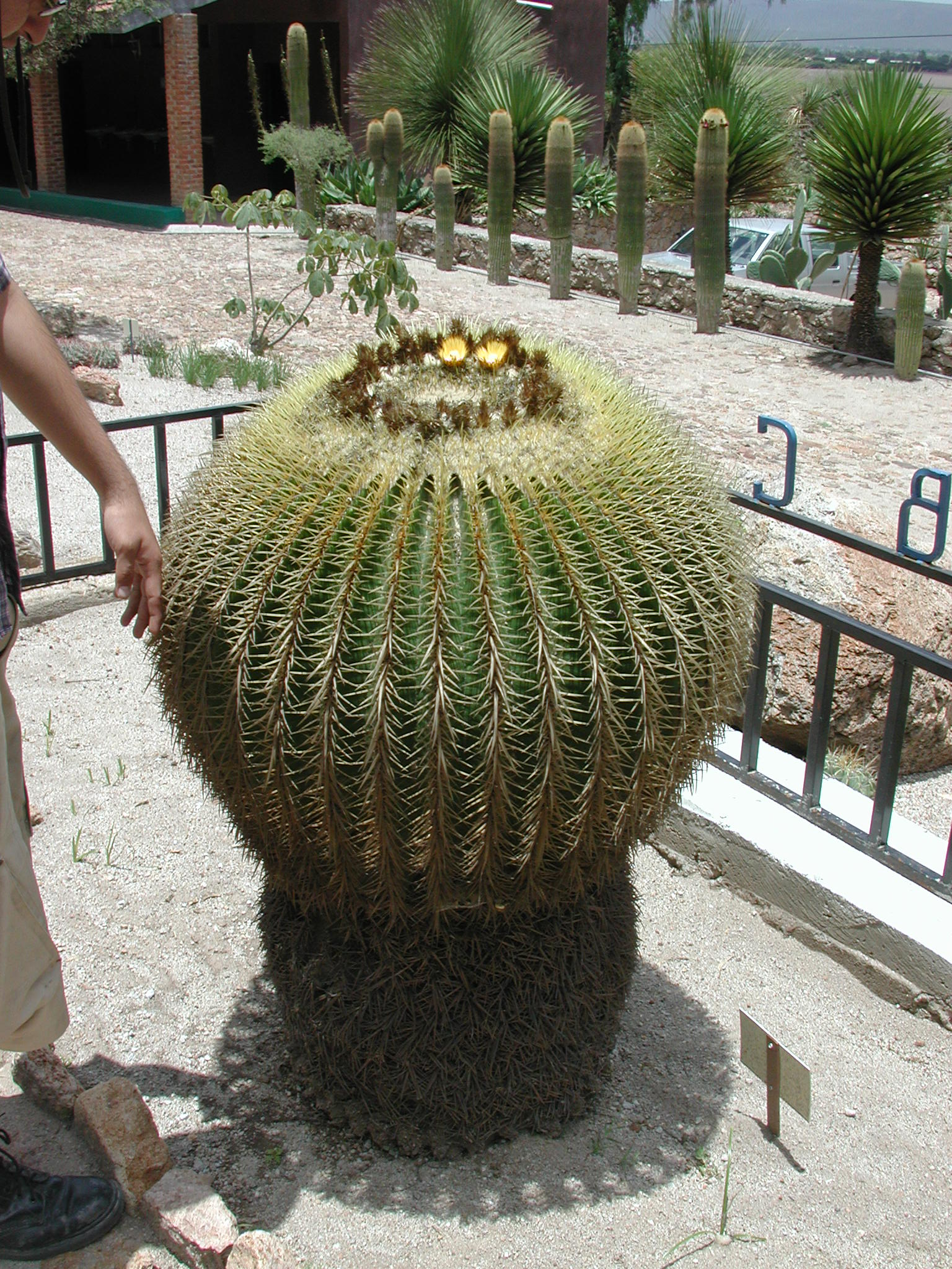 Echinocactus grusonii at Jardín Botanico Regional de Cadereyta, Querétaro, México. Neobuxbaumia polylopha and Yucca sp. in the background.